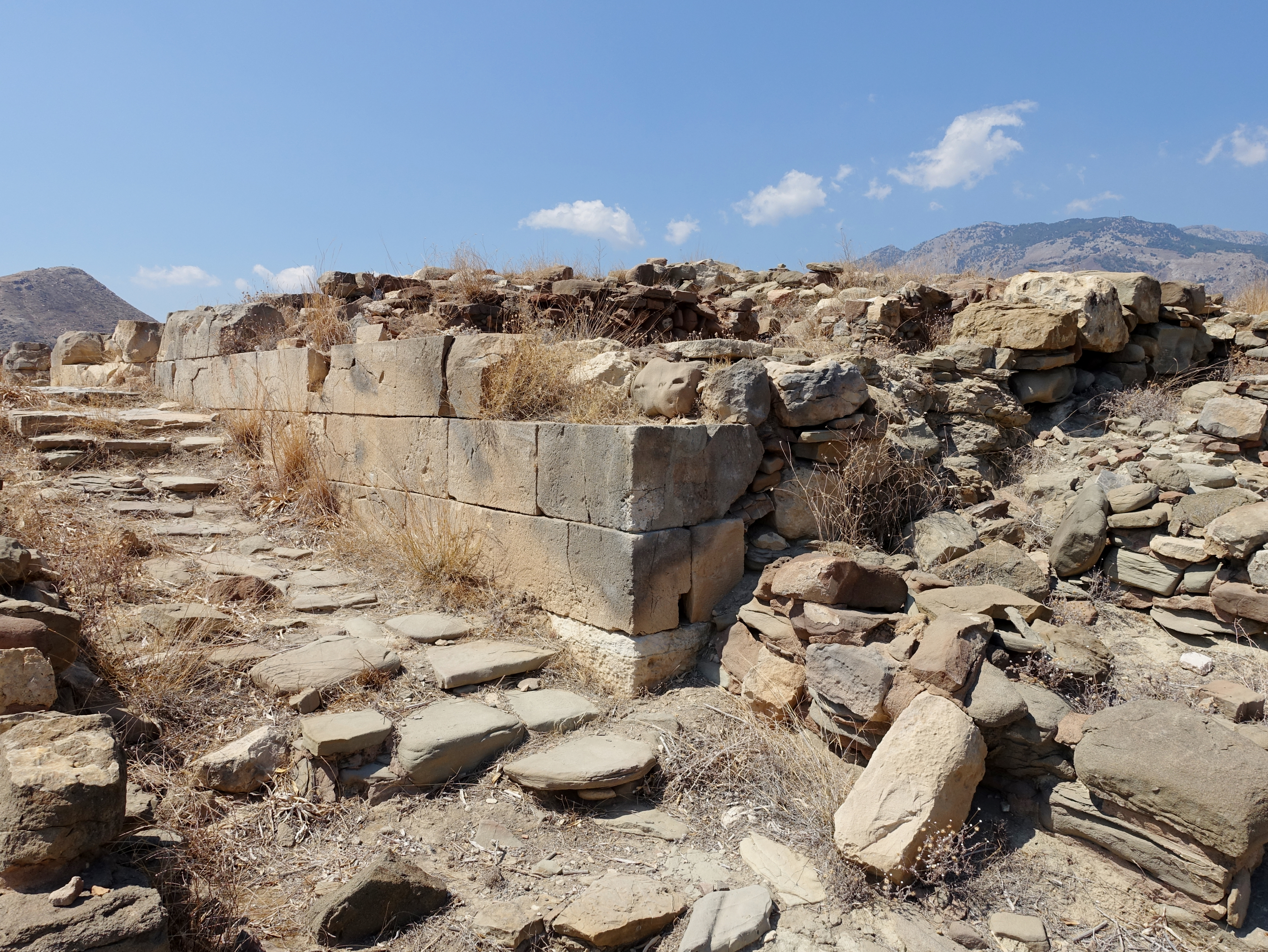 Ausgrabungsstätte von Pyrgos bei Myrtos, Kreta, Griechenland